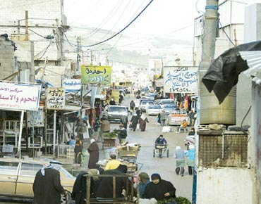 خيم البقعة